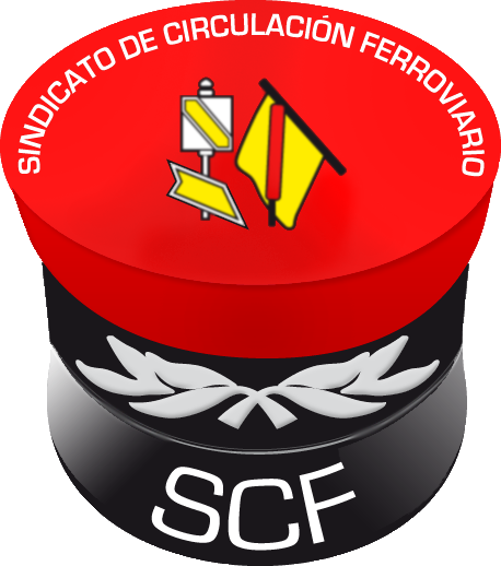 Logotipo Sindicato de Circulación Ferroviario